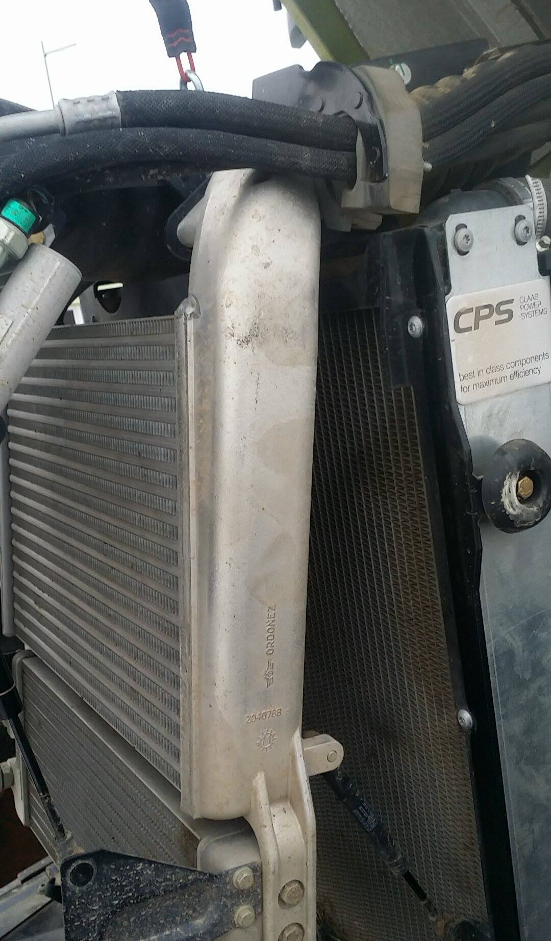 Traktori vahejahuti